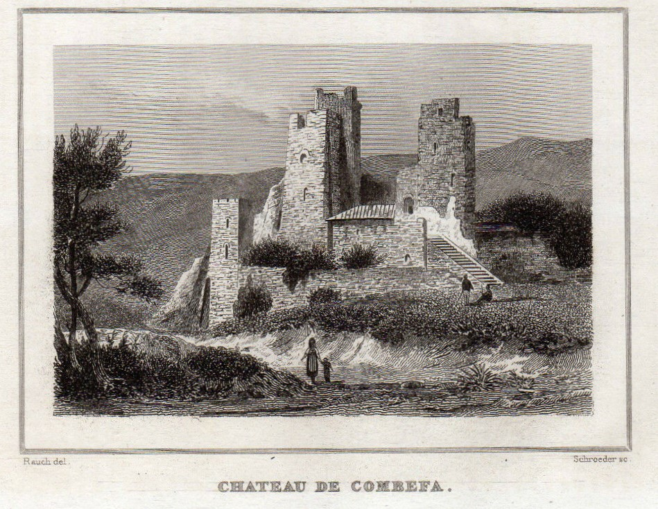 Gravure du château de Combefa, dans le Tarn